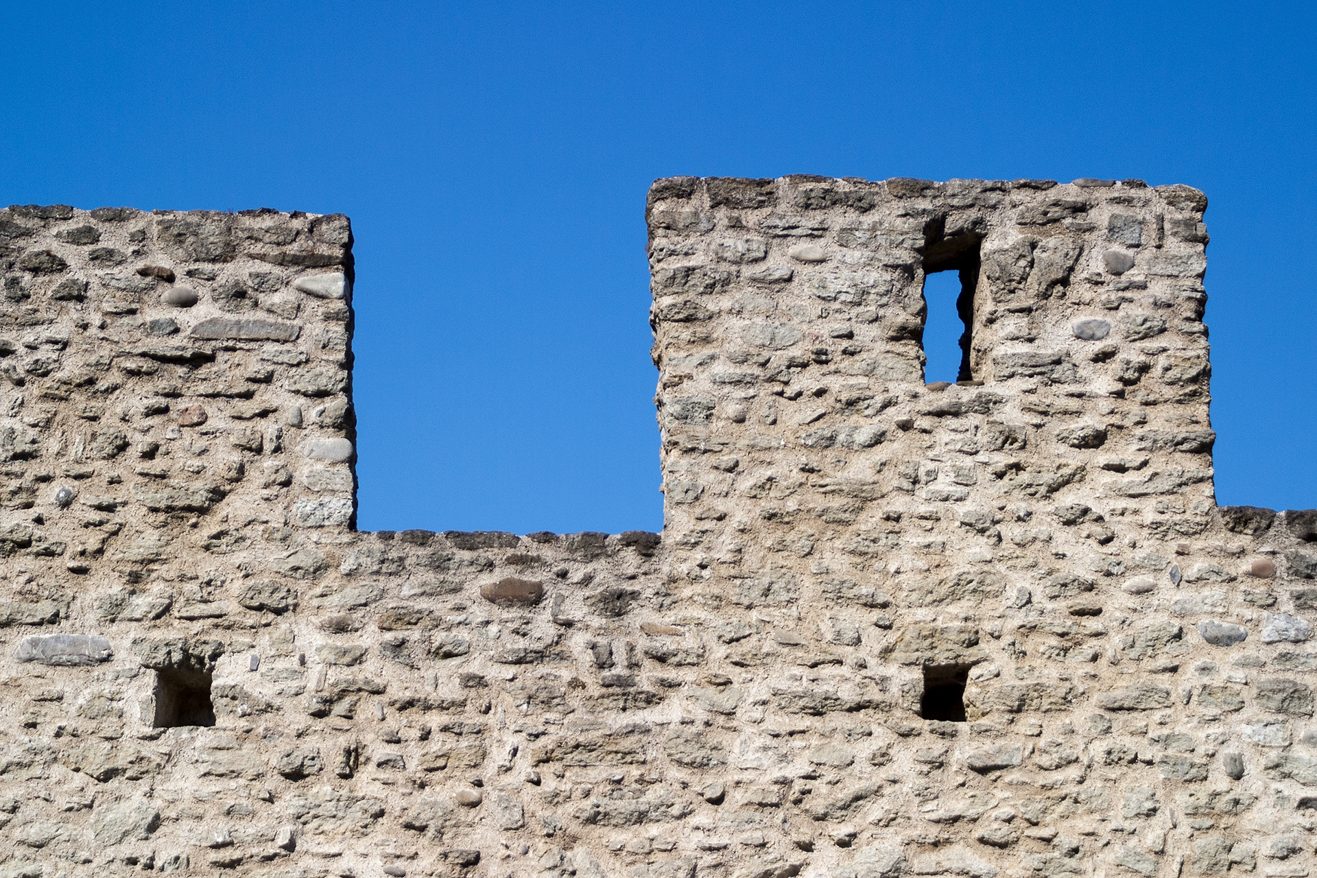 Detail der Stadtmauer von Lenzburg (AG)